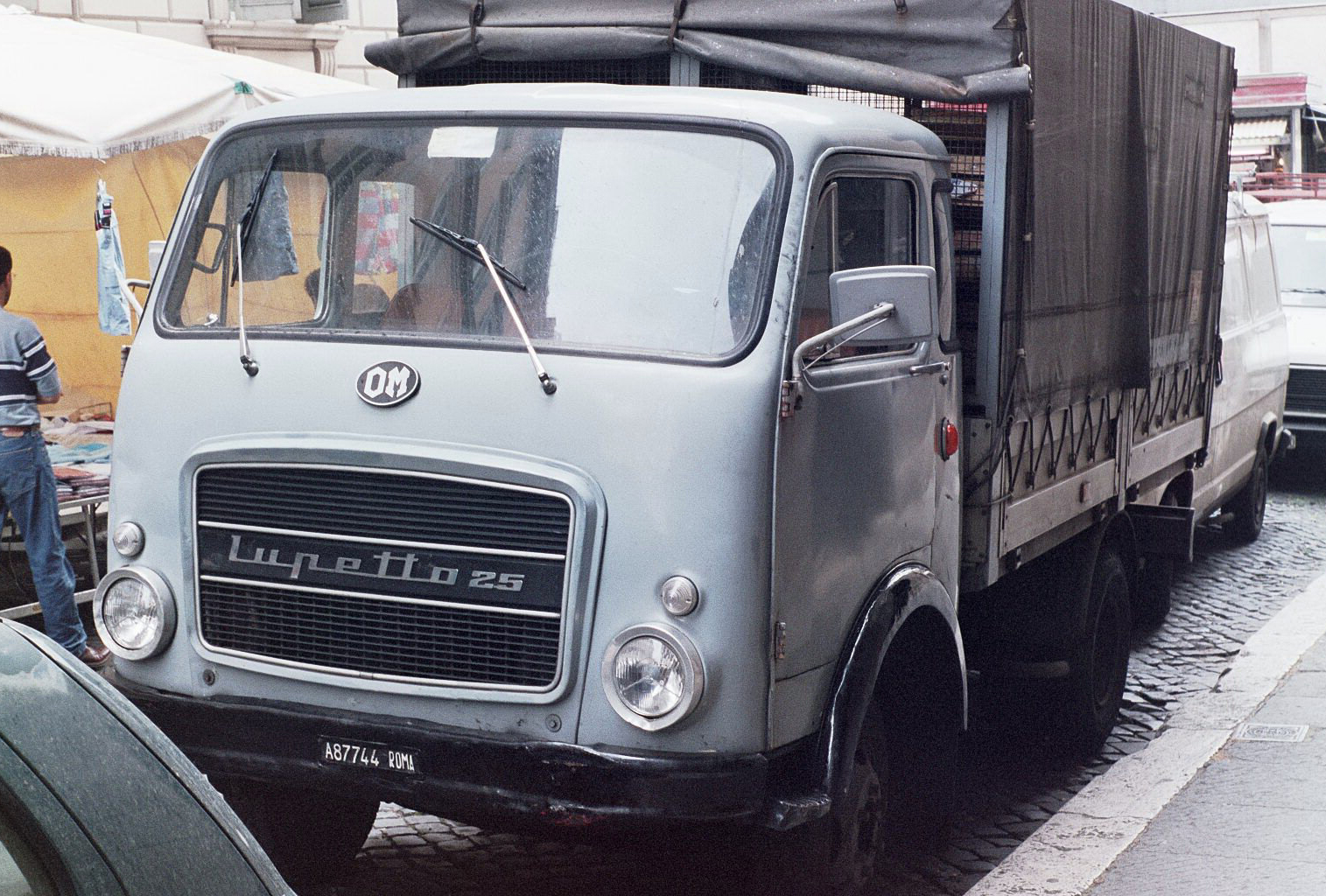 OM Lupetto 25, in Rome 2001.